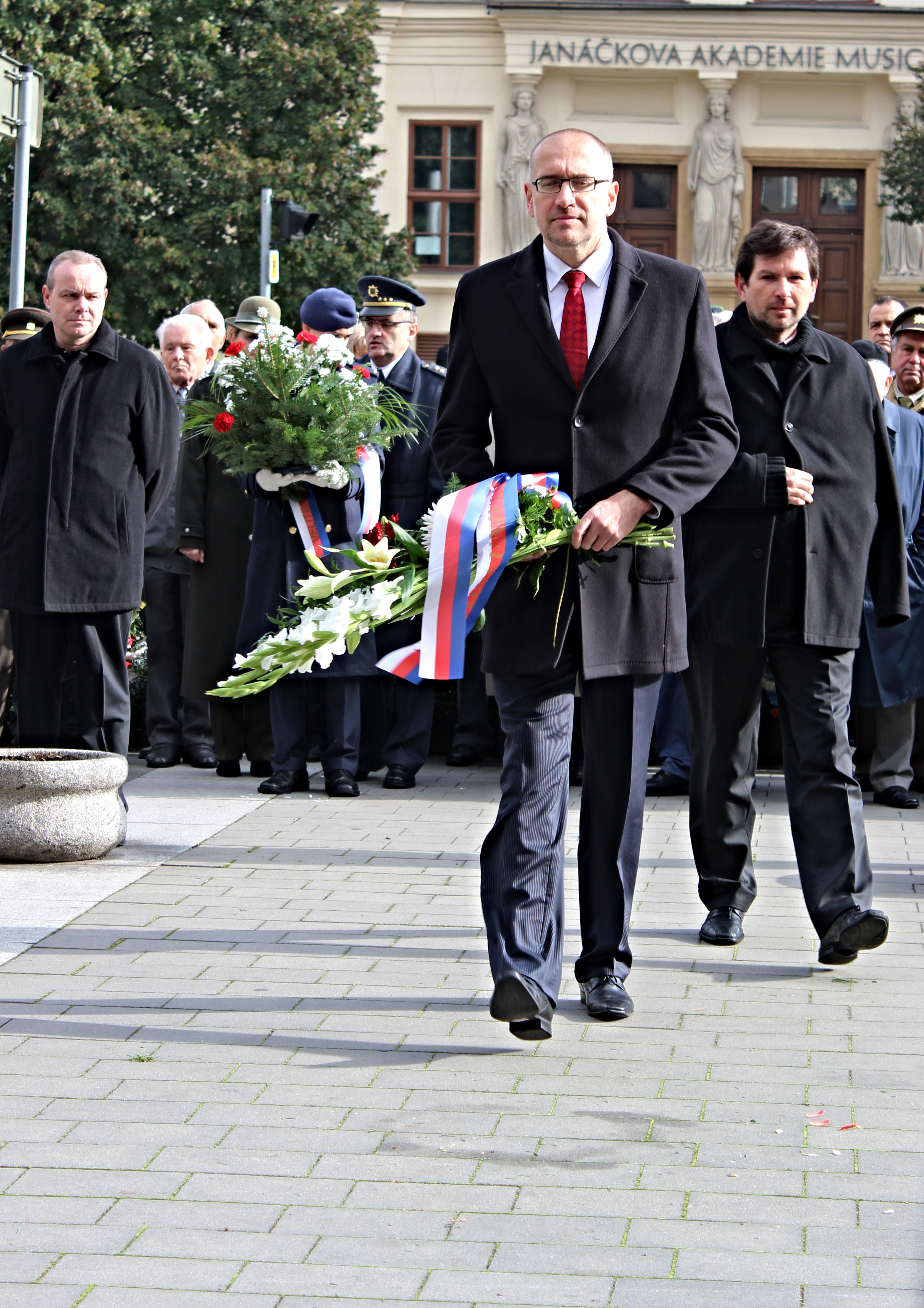 Oslavy svátku Vzniku Československé republiky u sochy prezidenta Masaryka na Komenského náměstí v Brně. Rektor MU Mikuláš Bek